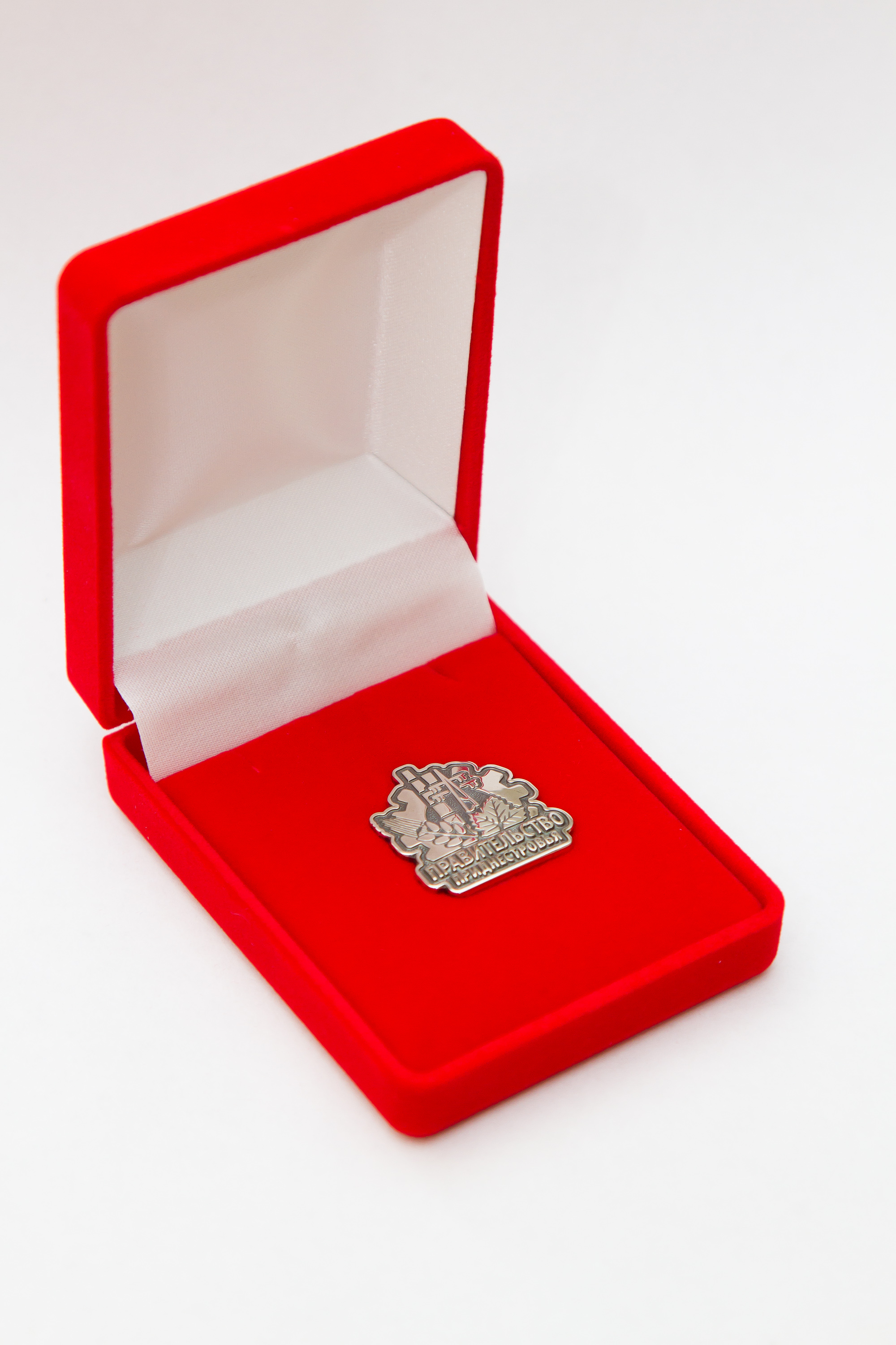 Нагрудный знак к Почетной грамоте Правительства ПМР в футляре